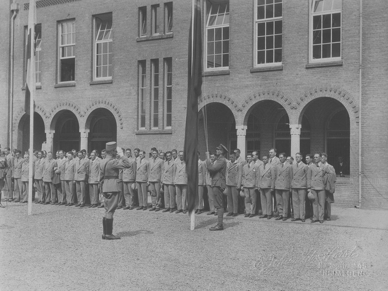 De leden van de Road Walking Association (GBR) tijdens de Vlaggenparade op het binnenterrein van de Prins Hendrikkazerne op de maandagmiddag voorafgaande aan de 18e Vierdaagse.